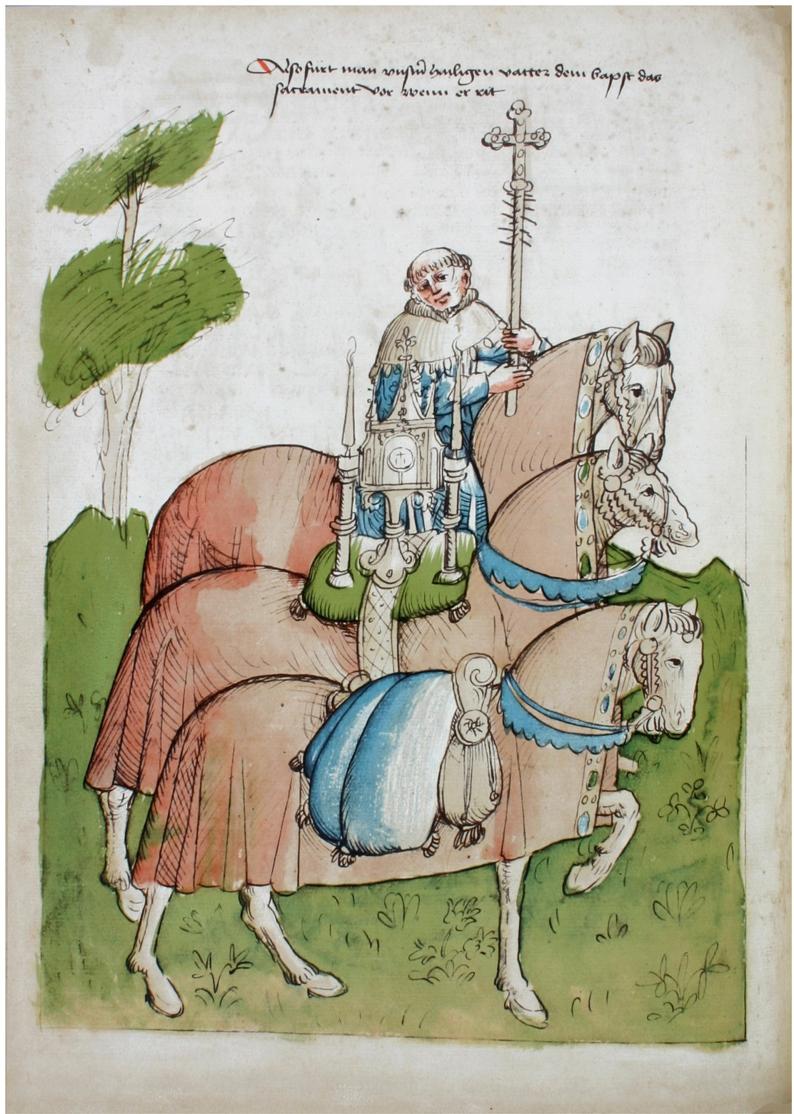 Rosgartenmuseum Konstanz, Hs. 1, Richental: Konzilschronik. In: Feger, Otto (Bearb.): Ulrich Richental: Das Konzil zu Konstanz. Faksimile. Starnberg - Konstanz 1964. Fol. 6v